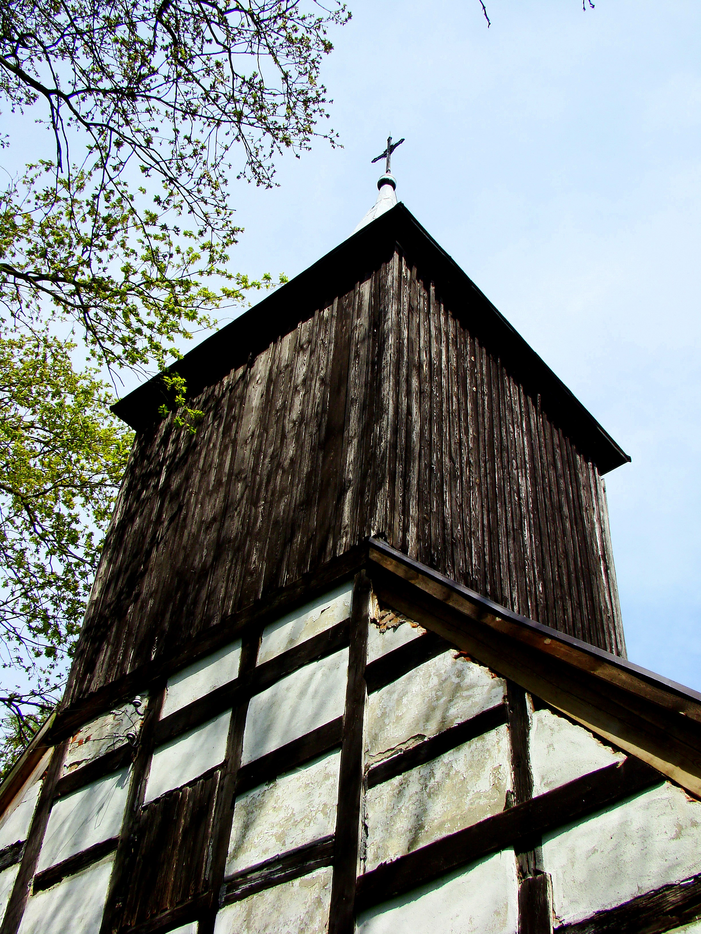 Kościół p.w. Św. Pawła w Tatyni, wieża kościelna, (Gmina Police, Powiat policki, Województwo zachodniopomorskie), Polska